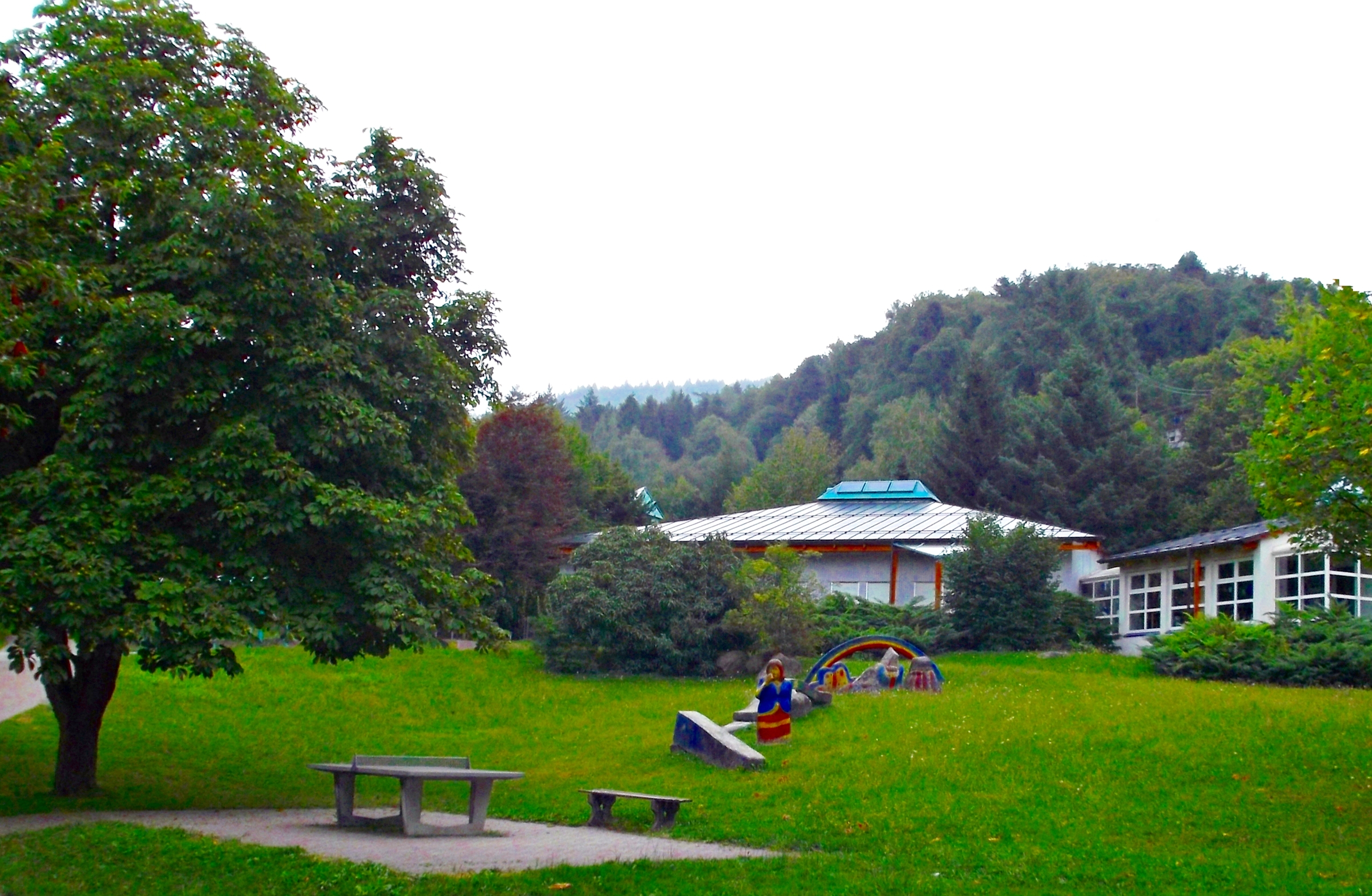 Evangelischer Kindergarten Gernsbach-Scheuern